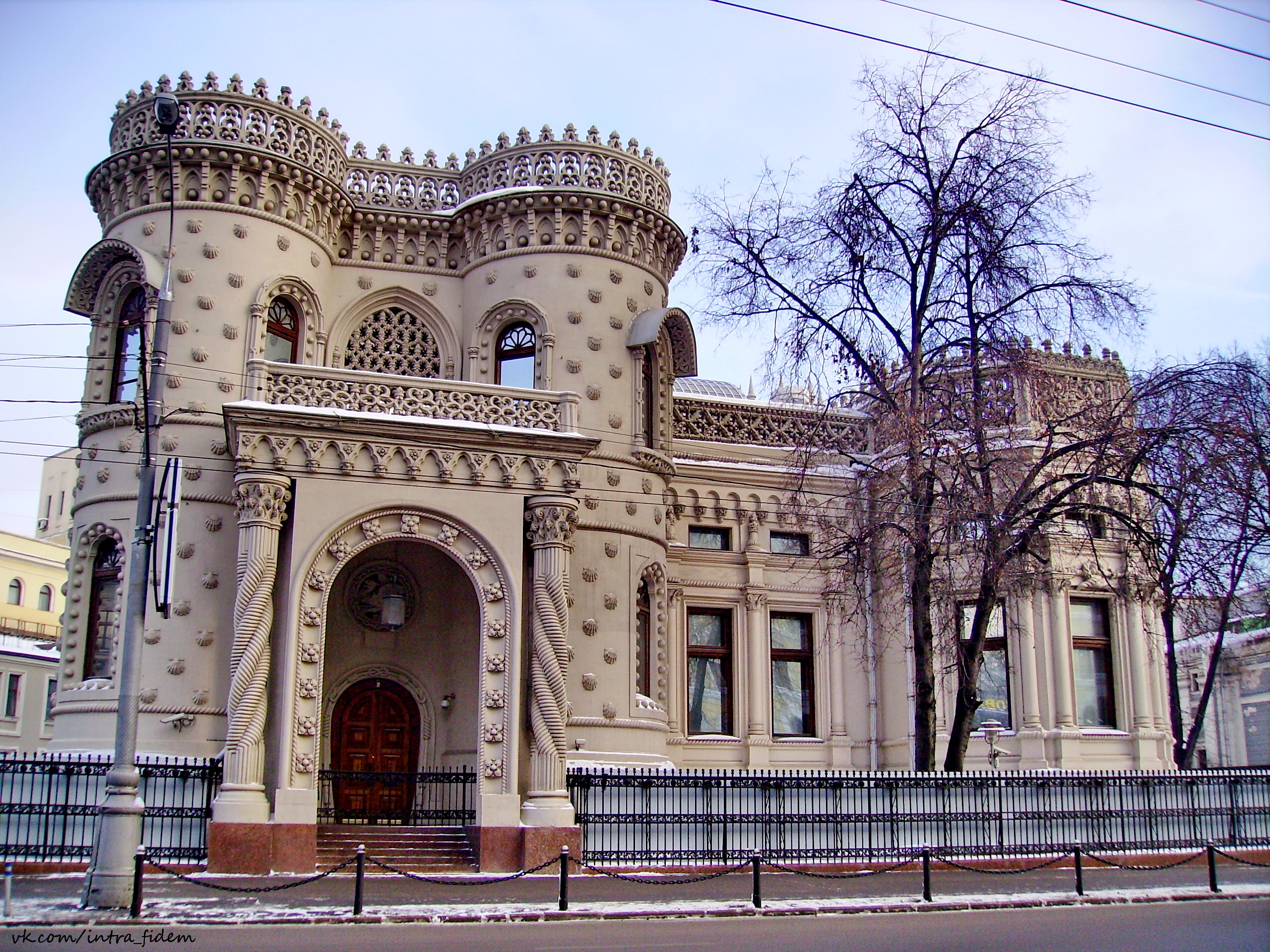 Усадьба Морозова А. А. (Москва и Московская область, Москва, Воздвиженка улица, 16)